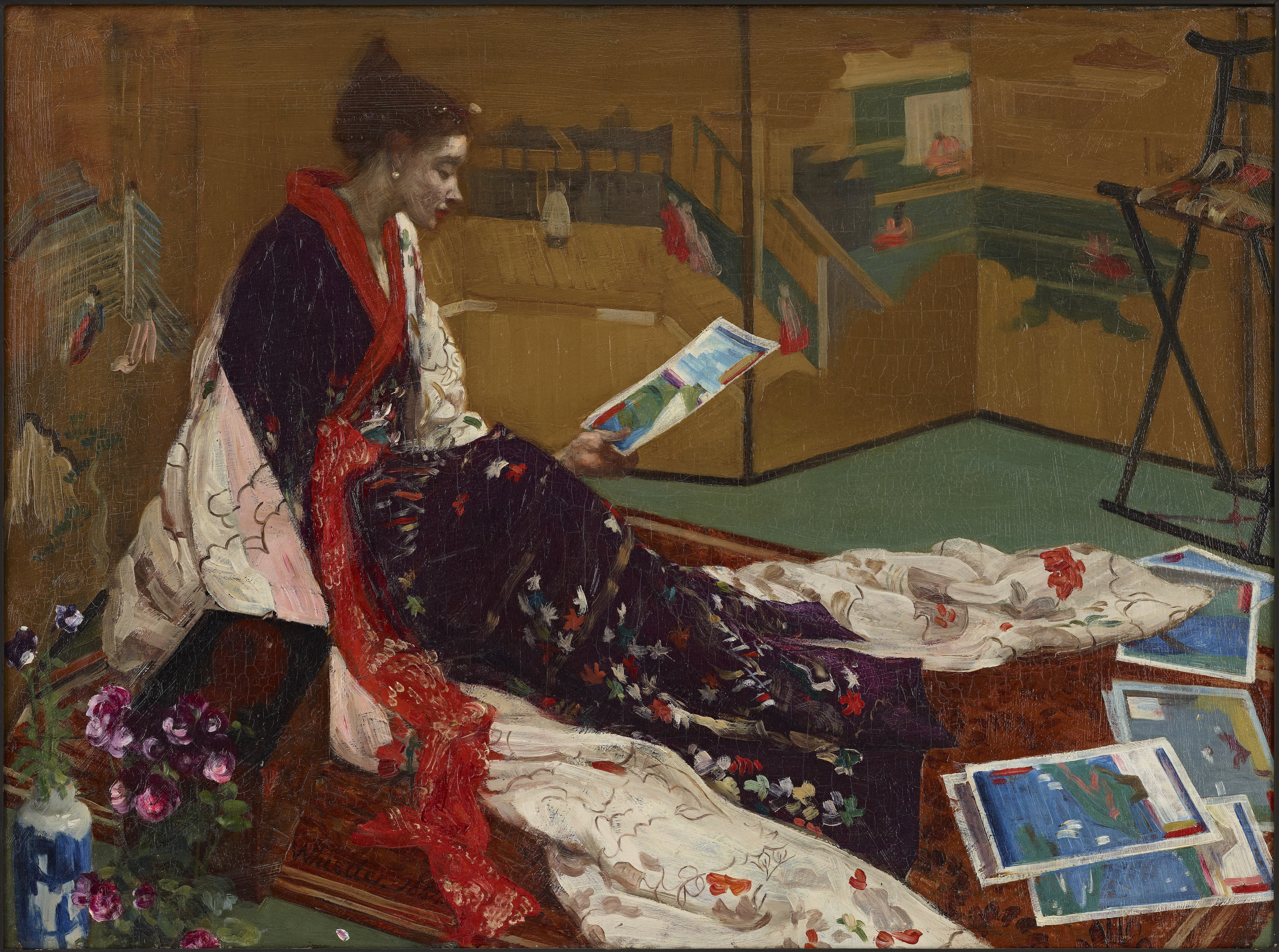 کاپریس در بنفش و طلایی؛ کیمونو و پارتیشن، نام اثری است از جیمز مک‌نیل ویسلر، نقاش برجستهٔ آمریکایی در سبک واقع‌گرایی که بر روی چوب خلق شد. این اثر اکنون در مالکیت نگارخانه هنر فریر قرار دارد.